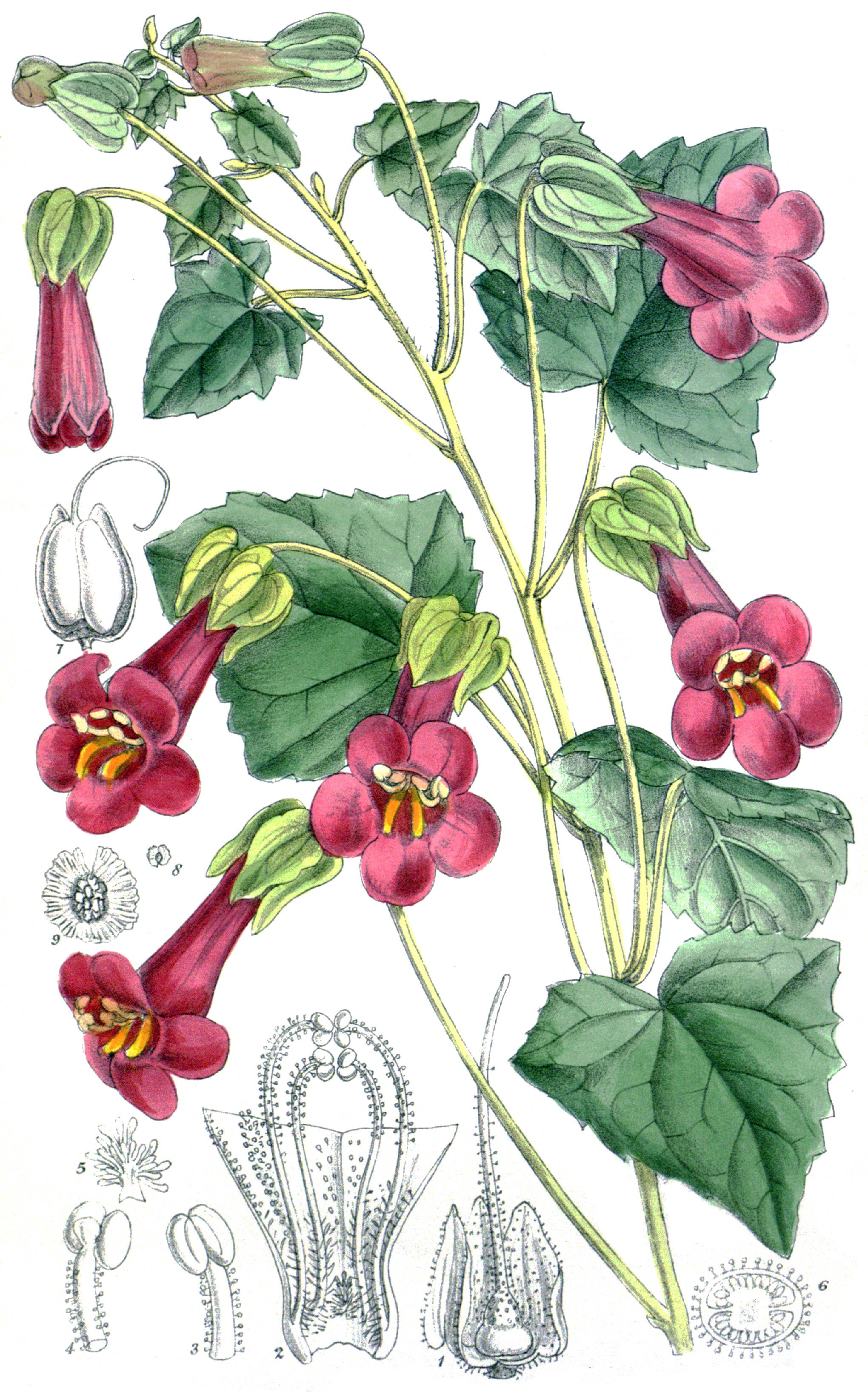 Lophospermum purpusii (as Maurandia purpusii), Plantaginaceae